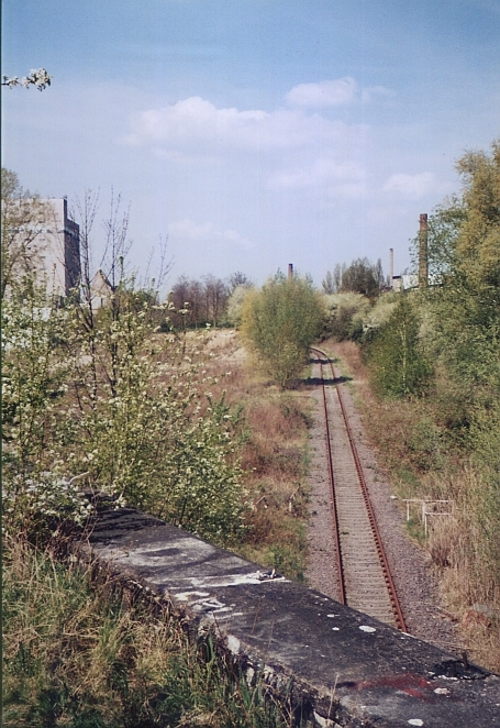 Überquerung der PX am Lindenauer Hafen in Leipzig